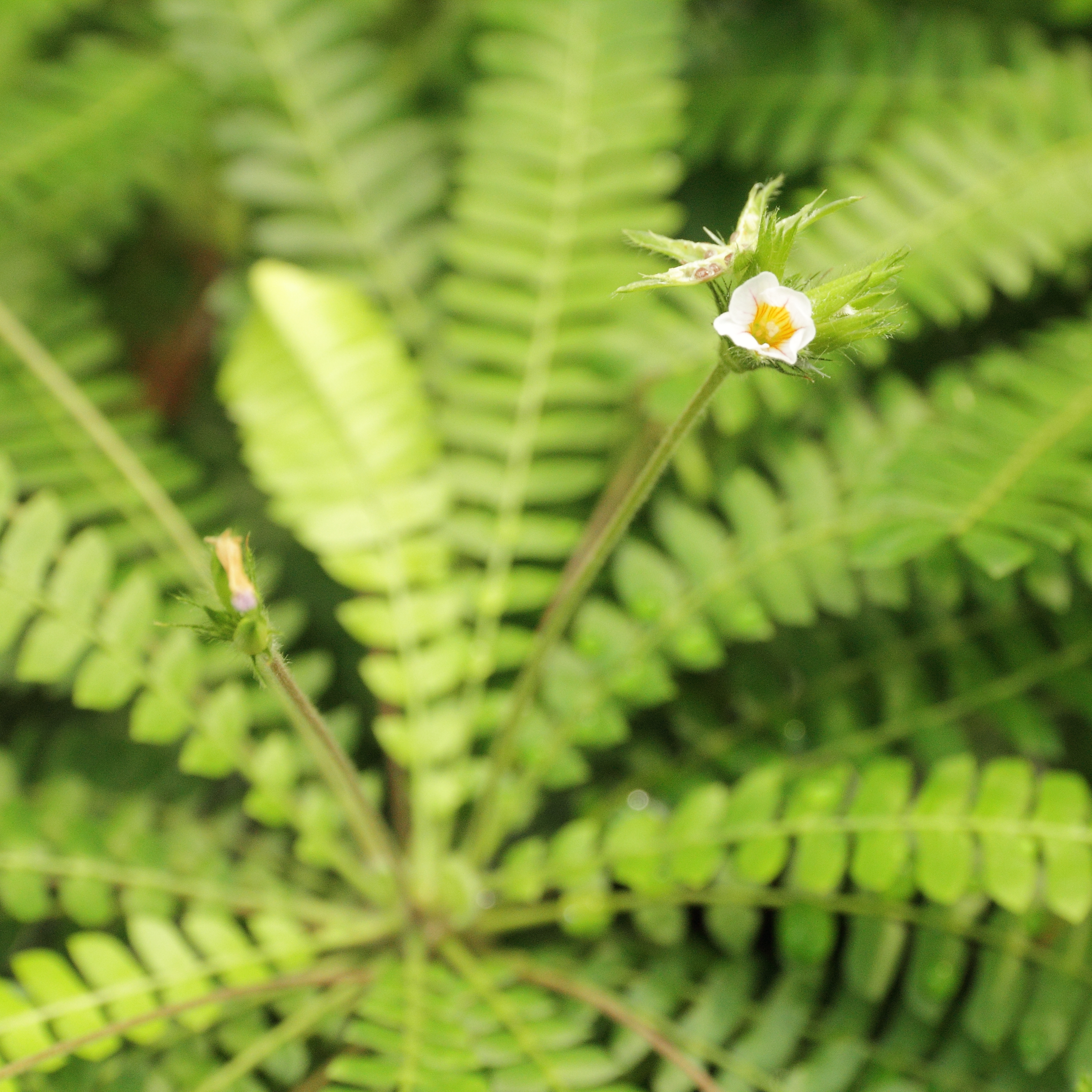 Biophytum sensitivum i Bergianska trädgården.